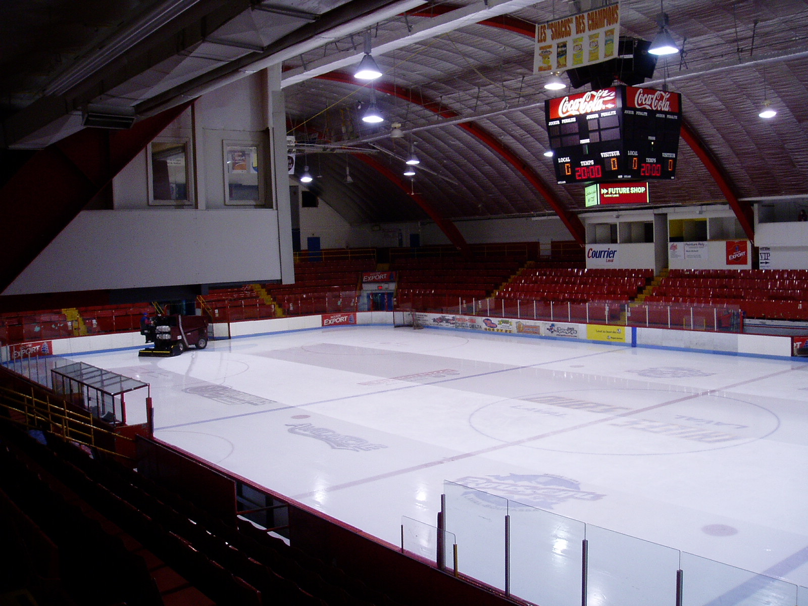 Intérieur du Colisée de Laval